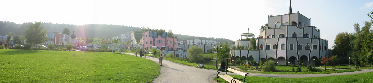 The hot springs in Blumau (Austria) desigend by Friedensreich Hundertwasser